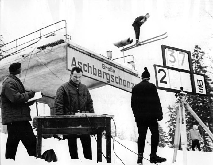 Zentralbild Kohls 26.2.1963 XIV. Deutsche Meisterschaften in den Nordischen Disziplinen Die XIV. Deutschen Meisterschaften in den Nordischen Disziplinen werden vom 20. bis 24. Februar 1963 in Klingenthal-Erzgebirge ausgetragen. UBz: Sportwissenschaftler von der DHfK Leipzig messen die Anlaufgeschwindigkeit der Springer am Schanzentisch.